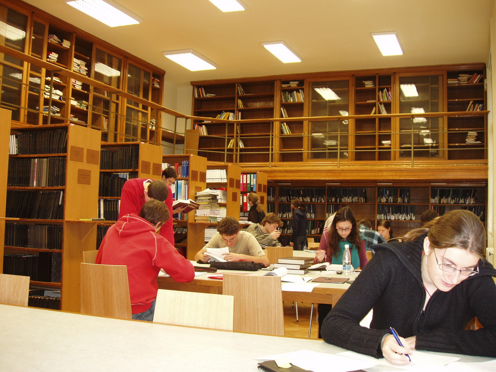 Knihovna geografie PřF UK, studovna